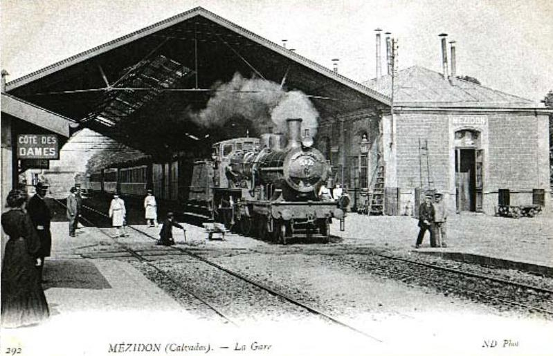 Gare de Mézidon à la Belle-Époque